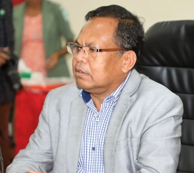 Bonifácio dos Reis, stellvertretender Gesundheitsminister Osttimors